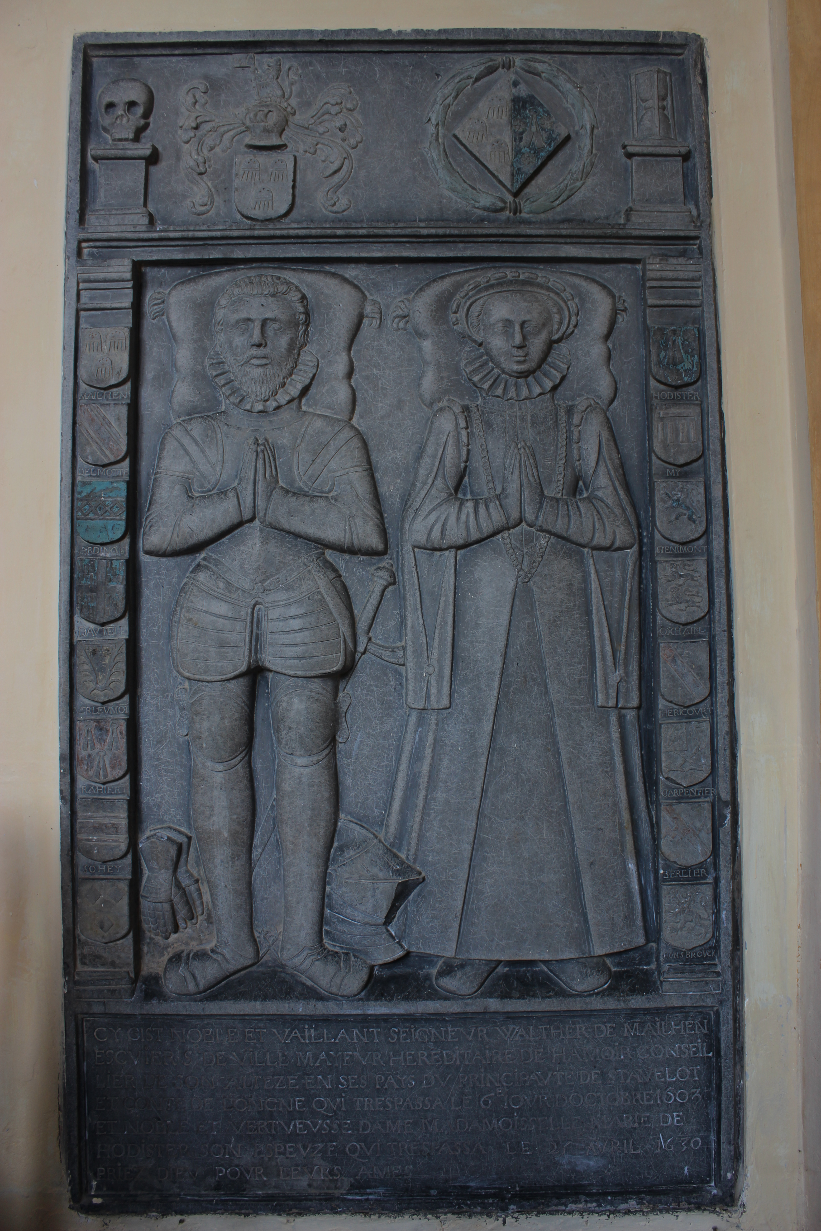 Pierre tombale de Walther de Maillen ( -1603) et Marie de Hodister ( -1630), située dans la chapelle de Hamoir-Lassus